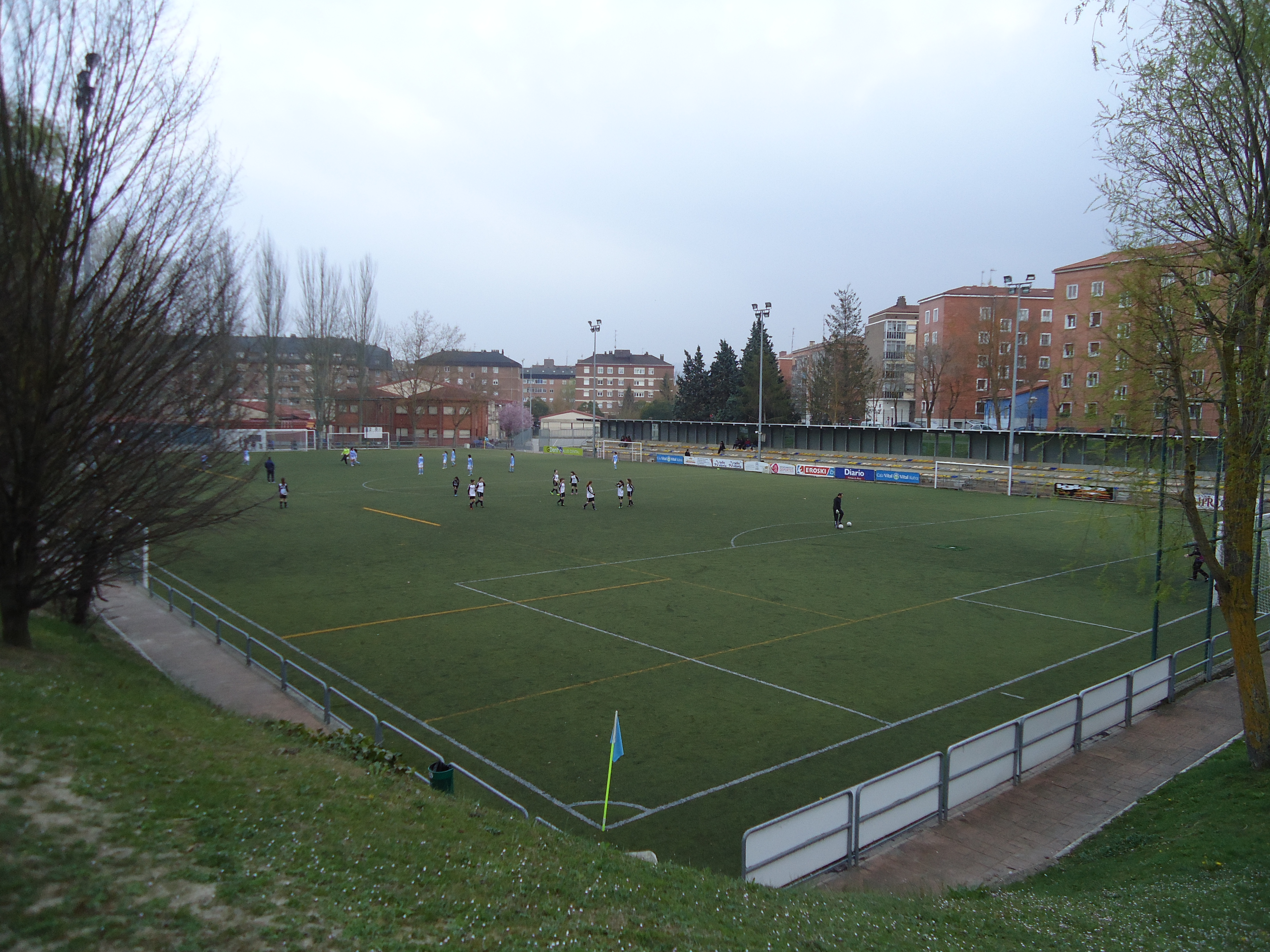 Ariznabarra auzoko (Gasteiz) futbol zelaia